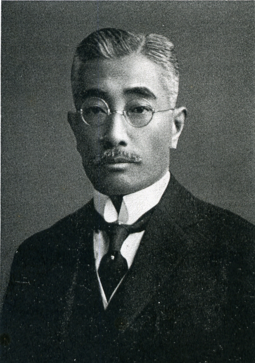 この写真は、安藤正純（1876-1955）の写真です。